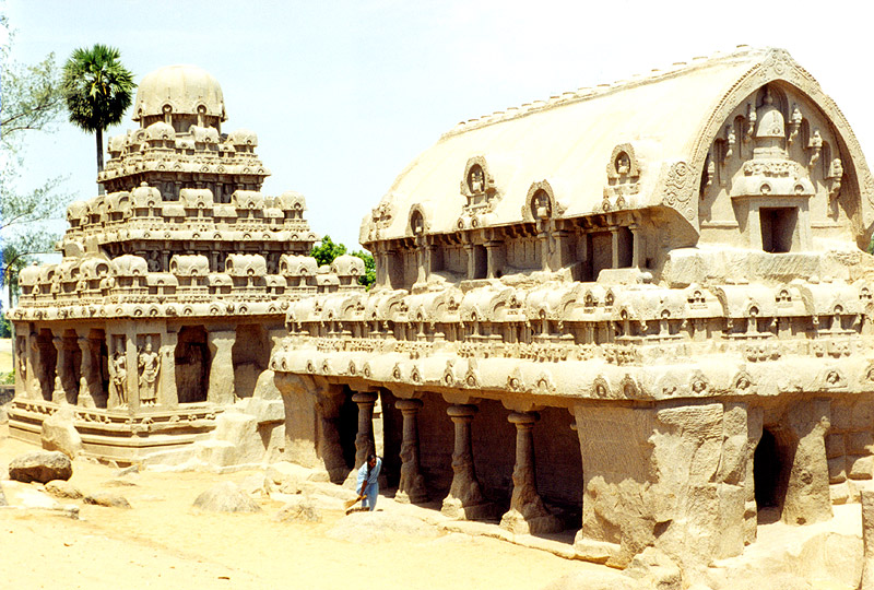 Les Pancha Rathas de Mahaballipuram au Tamil Nadu en Inde The Pancha Ratha in Mahabalipuram au Tamil Nadu en India